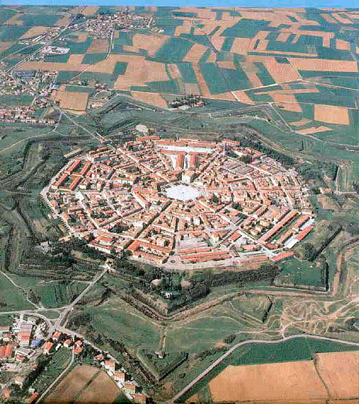 Copia da Commons del File:Palmanova aerea.jpg inserita da utente Mj6s in data 29 giu 2007, poiché non è stato possibile caricare in Wikivoyage